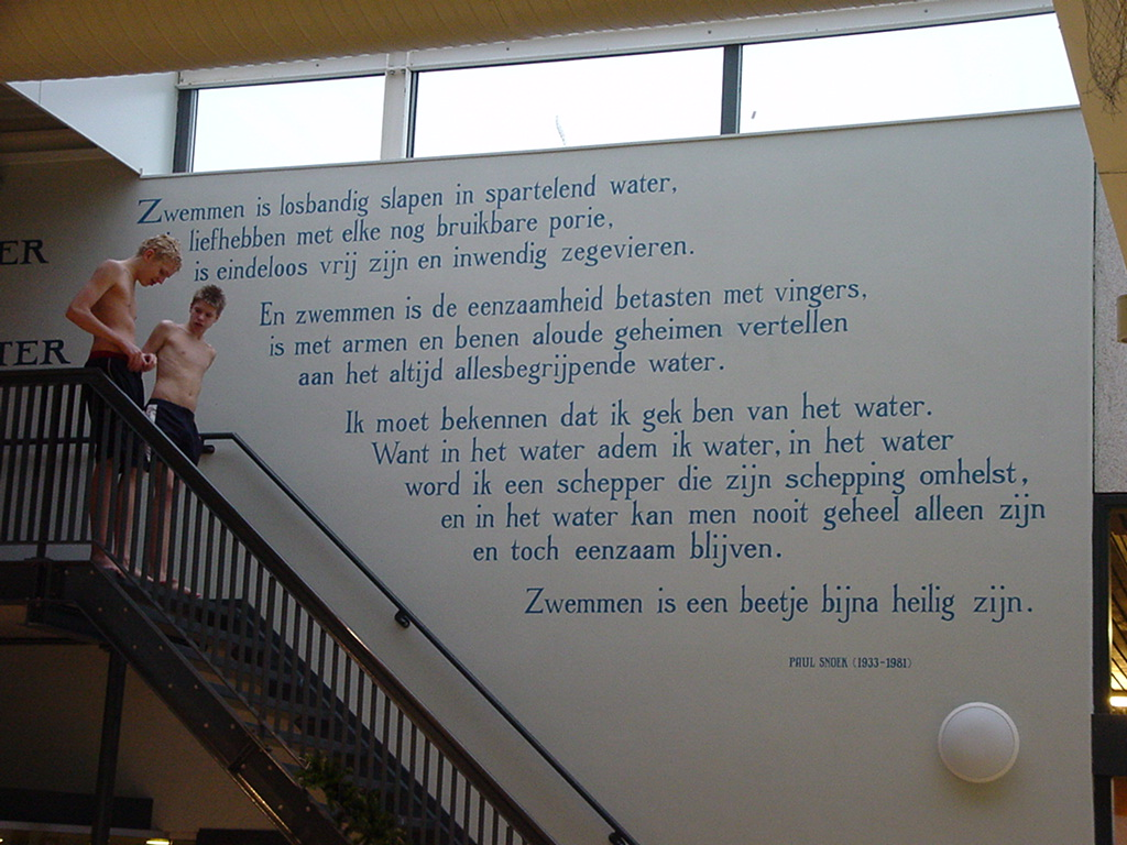 Paul Snoek: Een zwemmer is een ruiter. Muurgedicht Paramaribostraat 66 (in zwembad 'De Zijl'), Leiden, december 2003